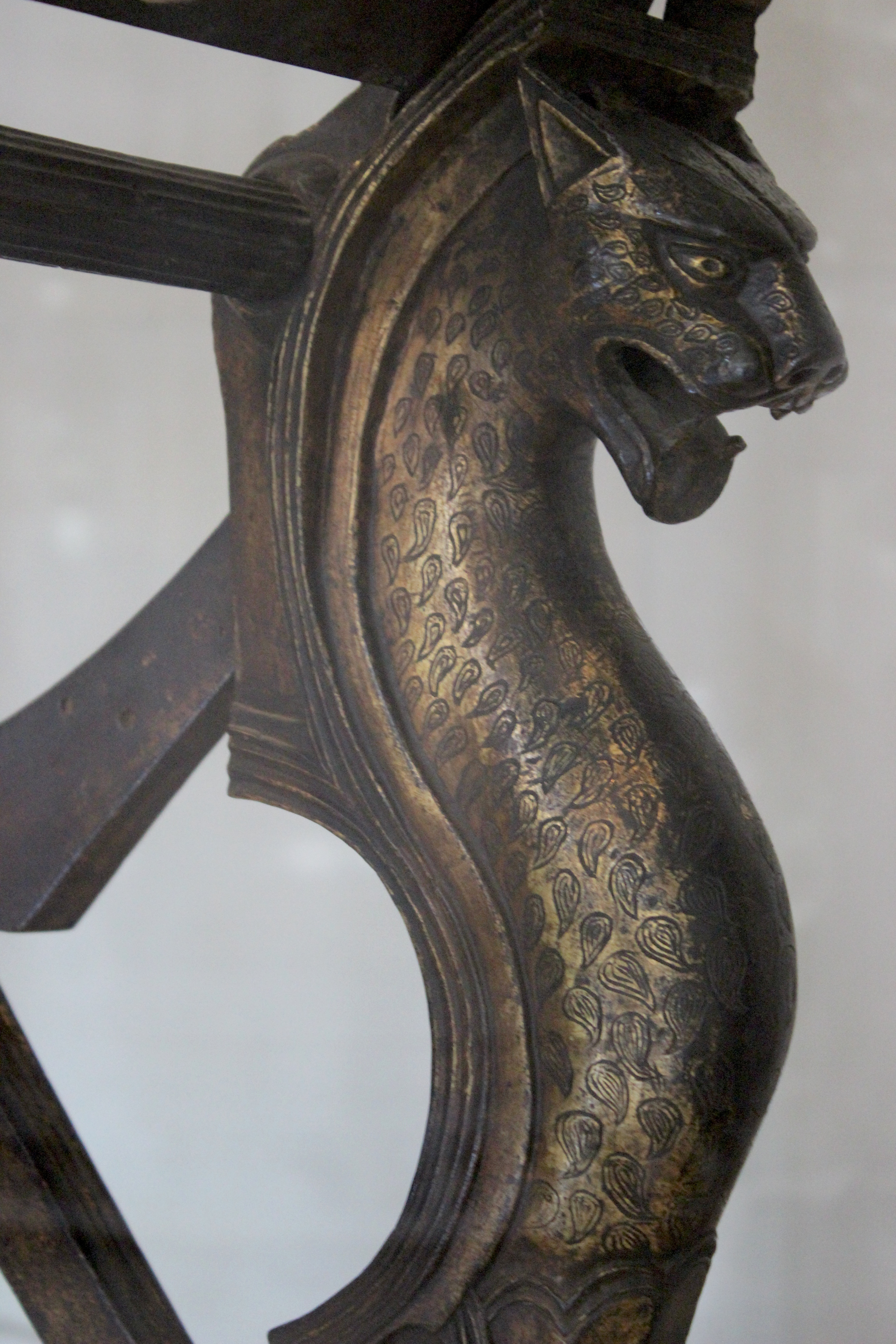 París, Biblioteca Nacional. Trono de Dagoberto.